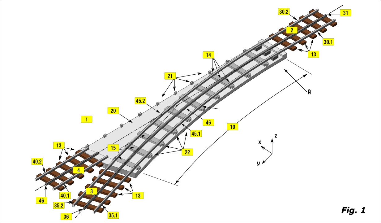 GLEISWEICHE / TRACK POINTS / AIGUILLAGE: RIGI-VTW 2000 Europäisches Patentamt / EUROPÄISCHE PATENTSCHRIFT / EP 1 214 473 B1 / 20.07.2005 Patentblatt 2005/29 / Anmeldenummer: 00958083.8 Anmeldetag: 18.09.2000 / Int Cl.7: E01B 25/06 / Internationale Anmeldenummer: PCT/CH2000/000502 Internationale Veröffentlichungsnummer: WO 2001/021894 (29.03.2001 Gazette 2001/13)